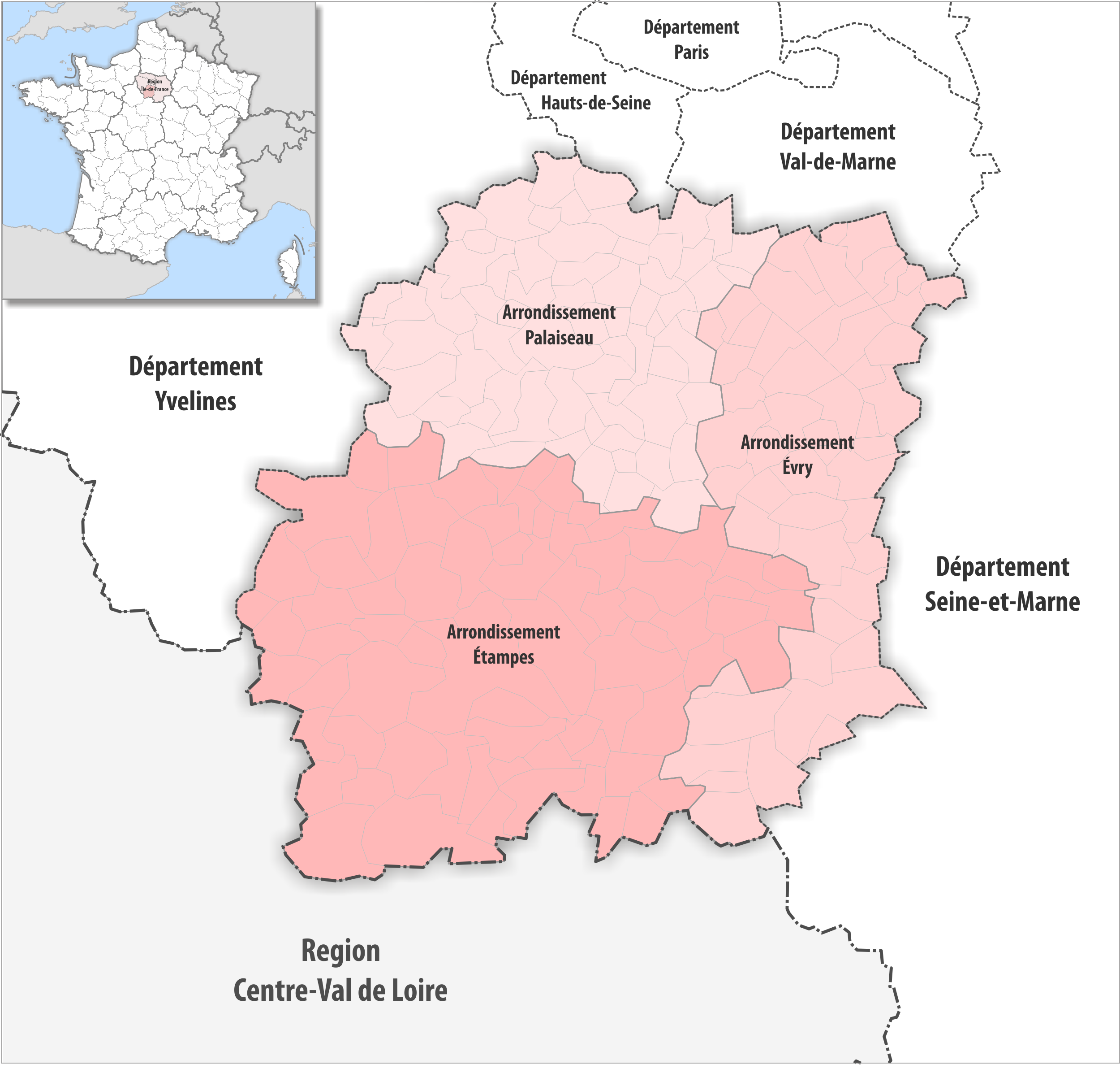 Gemeinden und Arrondissemente im Departement Essonne